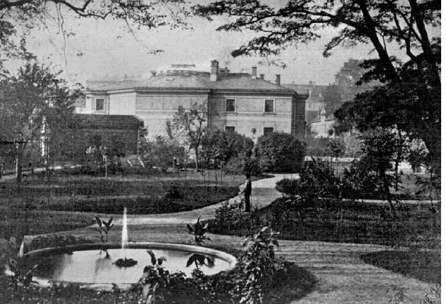 Czermaks Spectatorium 2 Hinteransicht mit Czermaks Garten